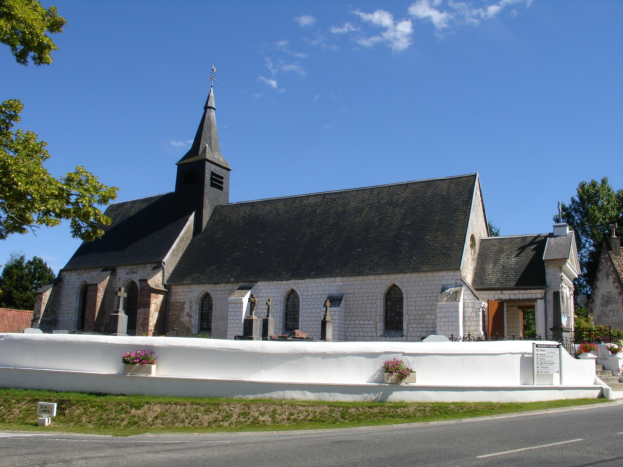 Église de Recques-sur-Course